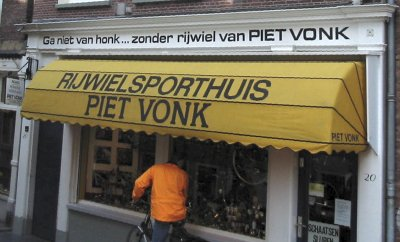 Kreupelrijm op een fietsenzaak van Piet Vonk in Delft, eigen foto door Elly. Hoewel deze foto wordt gebruikt op de pagina kreupelrijm is het geenszins de bedoeling de kwaliteit van deze winkel in twijfel te trekken.